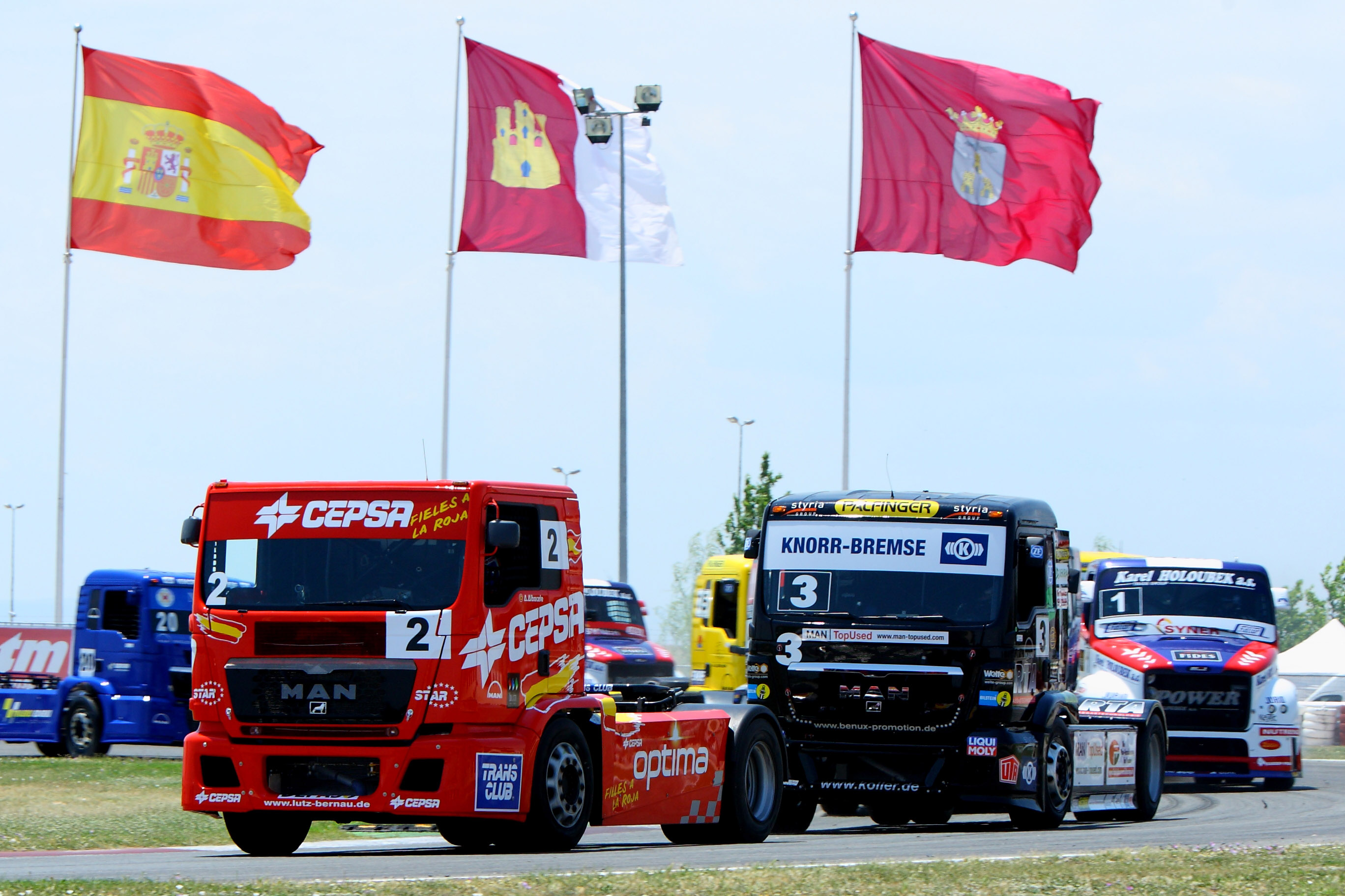 1ª carrera de Antonio Albacete